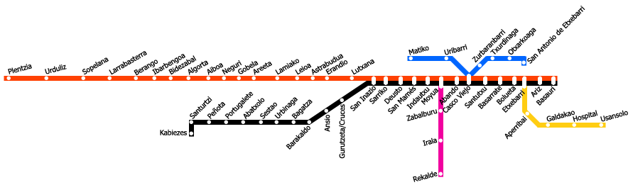 Mapa de la red de Metro Bilbao al completo.